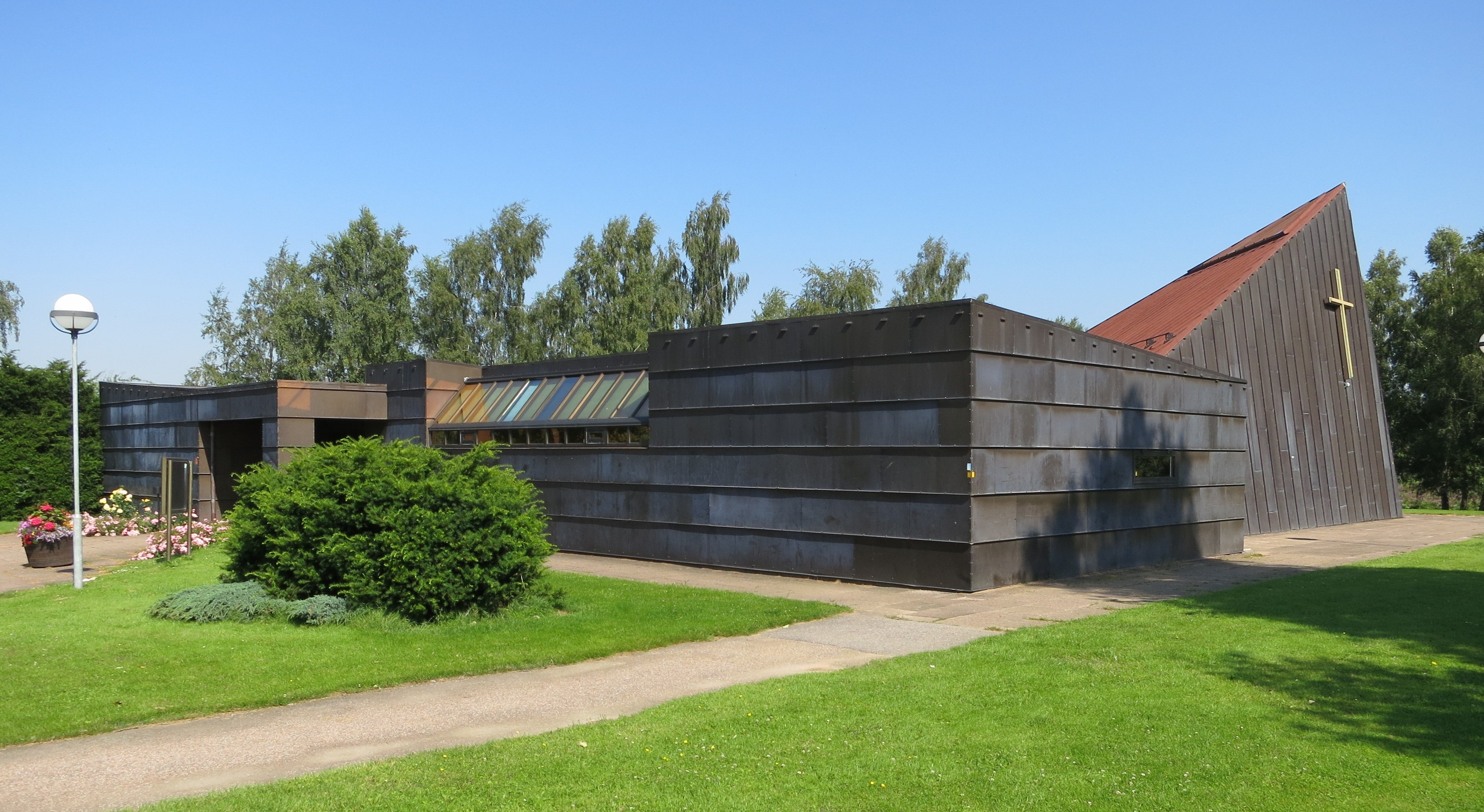 Vallås stadsdelskyrka i Halmstad